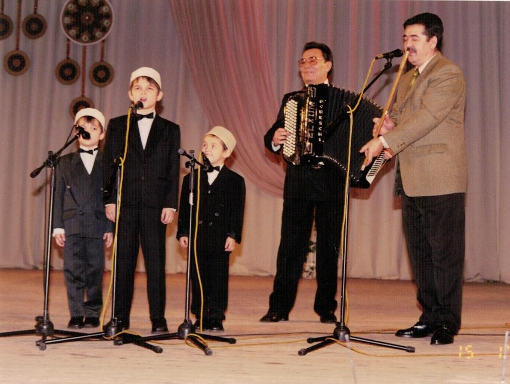 Ғәйзуллин Рәмил Мәүлит улы — музыкант, Башҡортостан Республикаһының халыҡ артисы